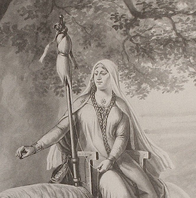 Bertha von Burgund auf einer Darstellung des Historienmalers Karl Jauslin